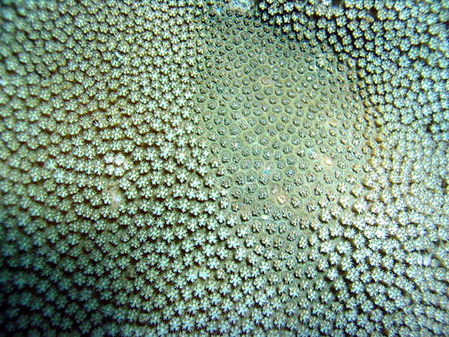 Goniopora fruticosa en Samoa Americana